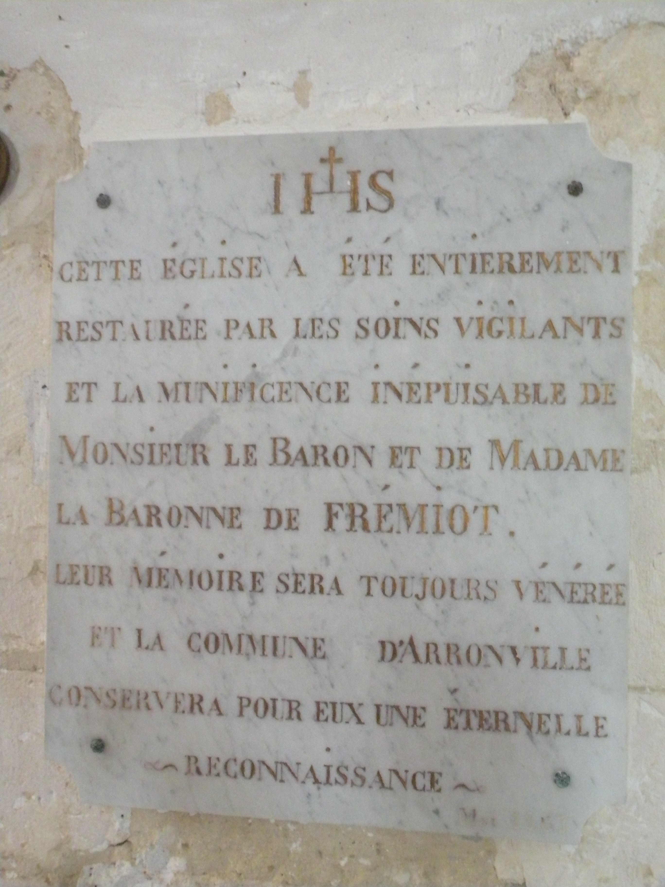 Intérieur de l'église Saint-Pierre-Saint-Paul d'Arronville